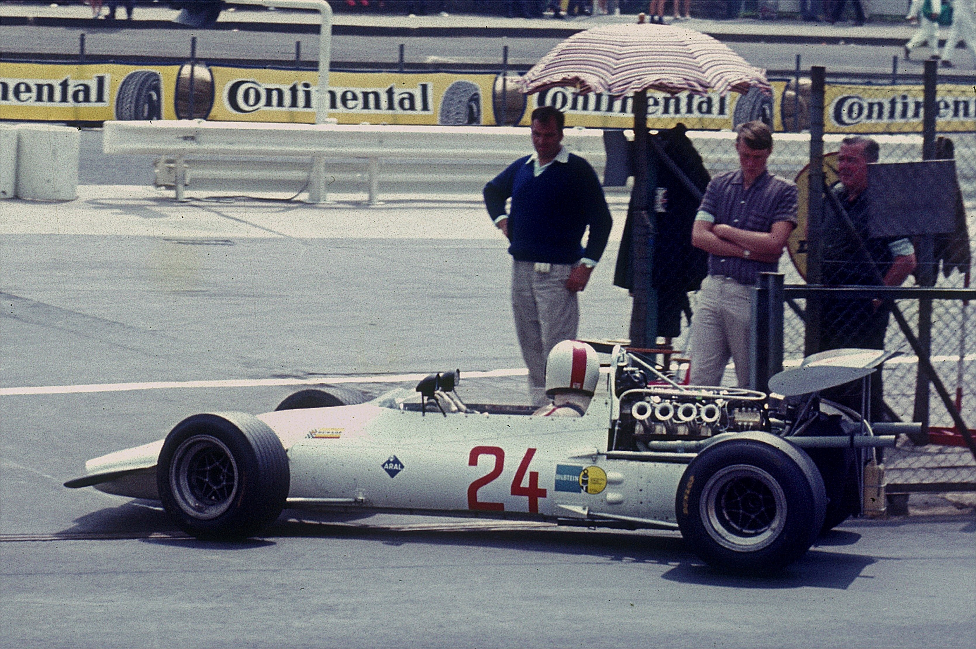 Gerhard Mitter am Morgen des 1. August 1969 im BMW 269